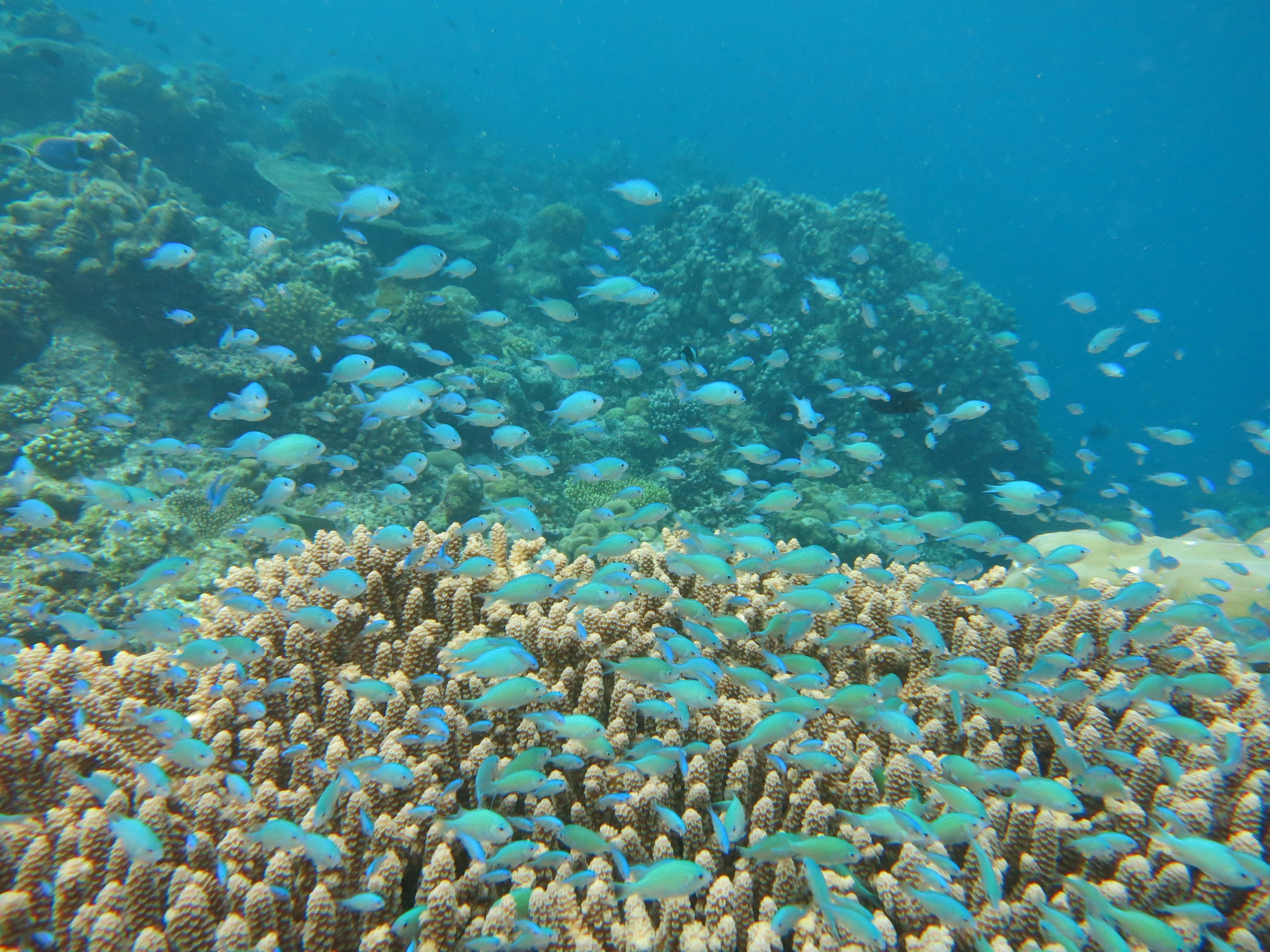 Un groupe de demoiselles bleues (Chromis viridis) aux Maldives (atoll de Baa).